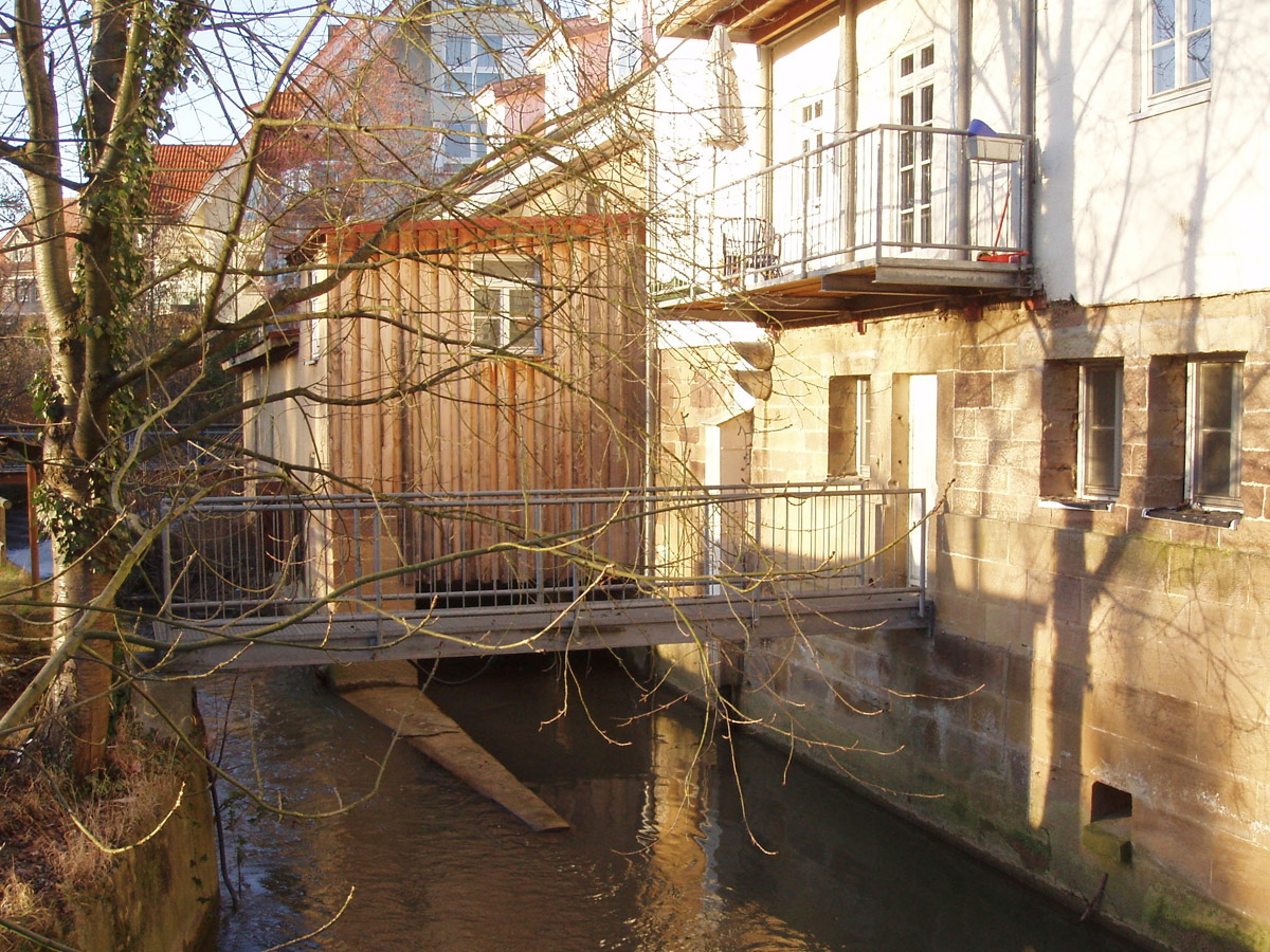 Mühlkanal bei der Ludwigschen Mühle in Heilbronn-Neckargartach